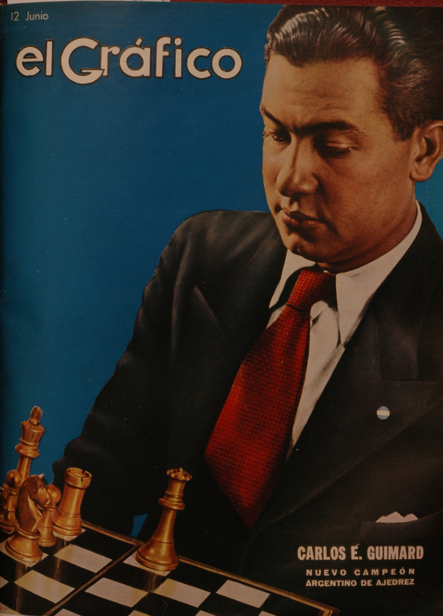 El Grafico del 12 de Junio de 1937. Edicion 935